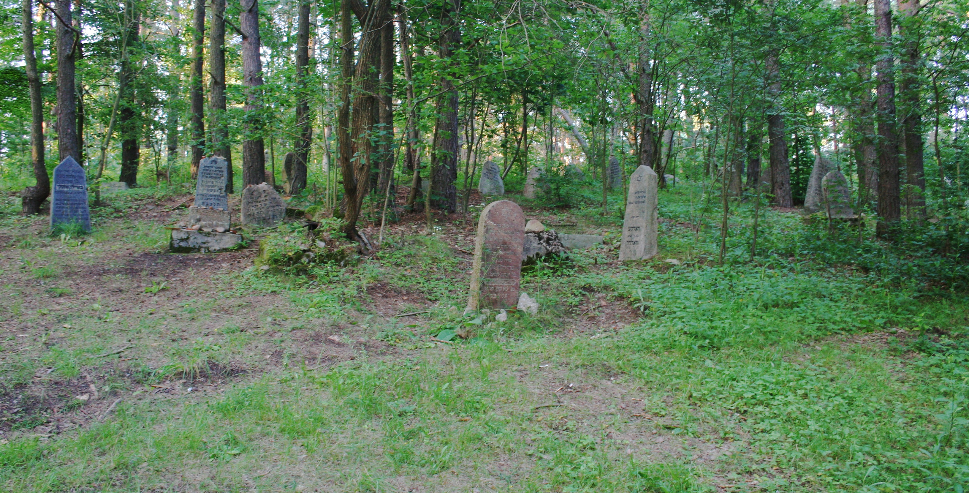 Cmentarz żydowski w Narewce, woj. podlaskie, fragment